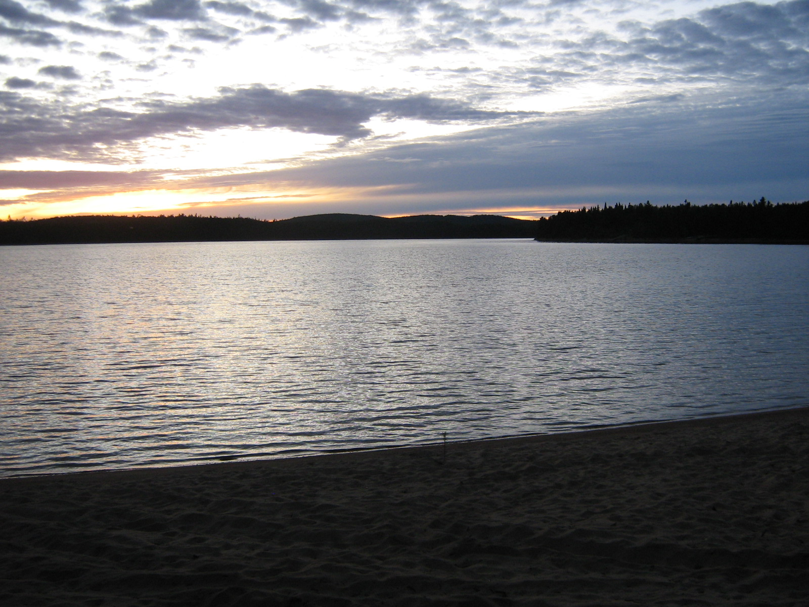 Aurore au lac des Aigles, dans la zec du Chapeau-de-Paille